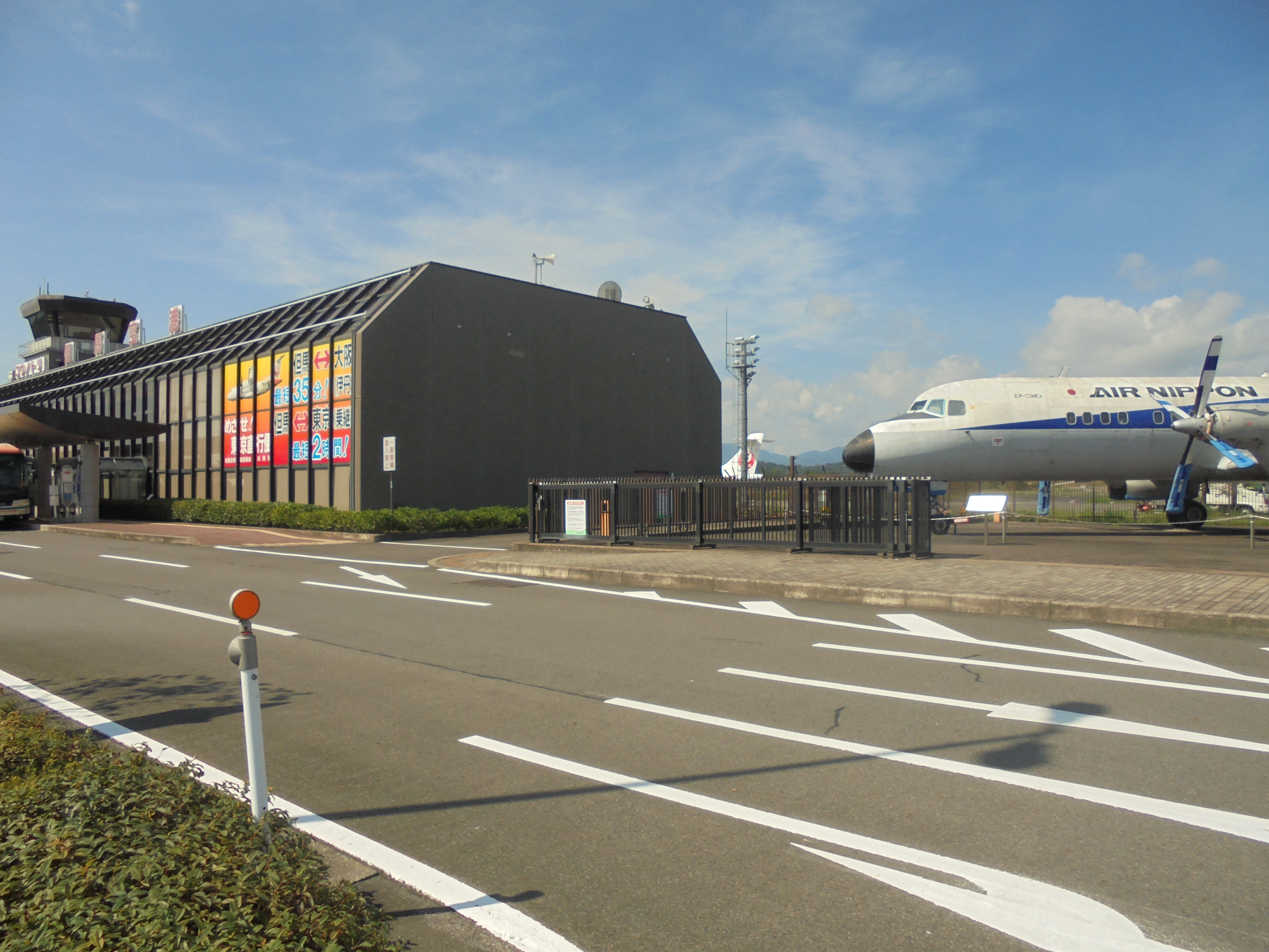 豊岡市にある空港